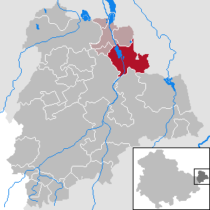 Windischleuba in Thuringia - District Altenburger Land